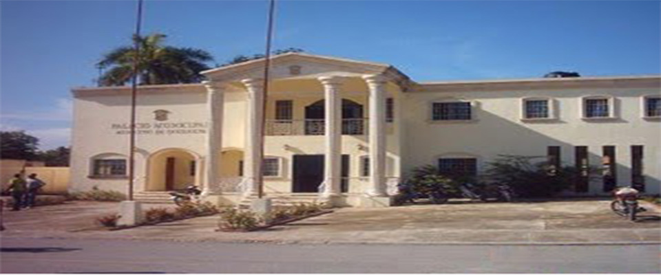 Palacio Municipal Quisqueya